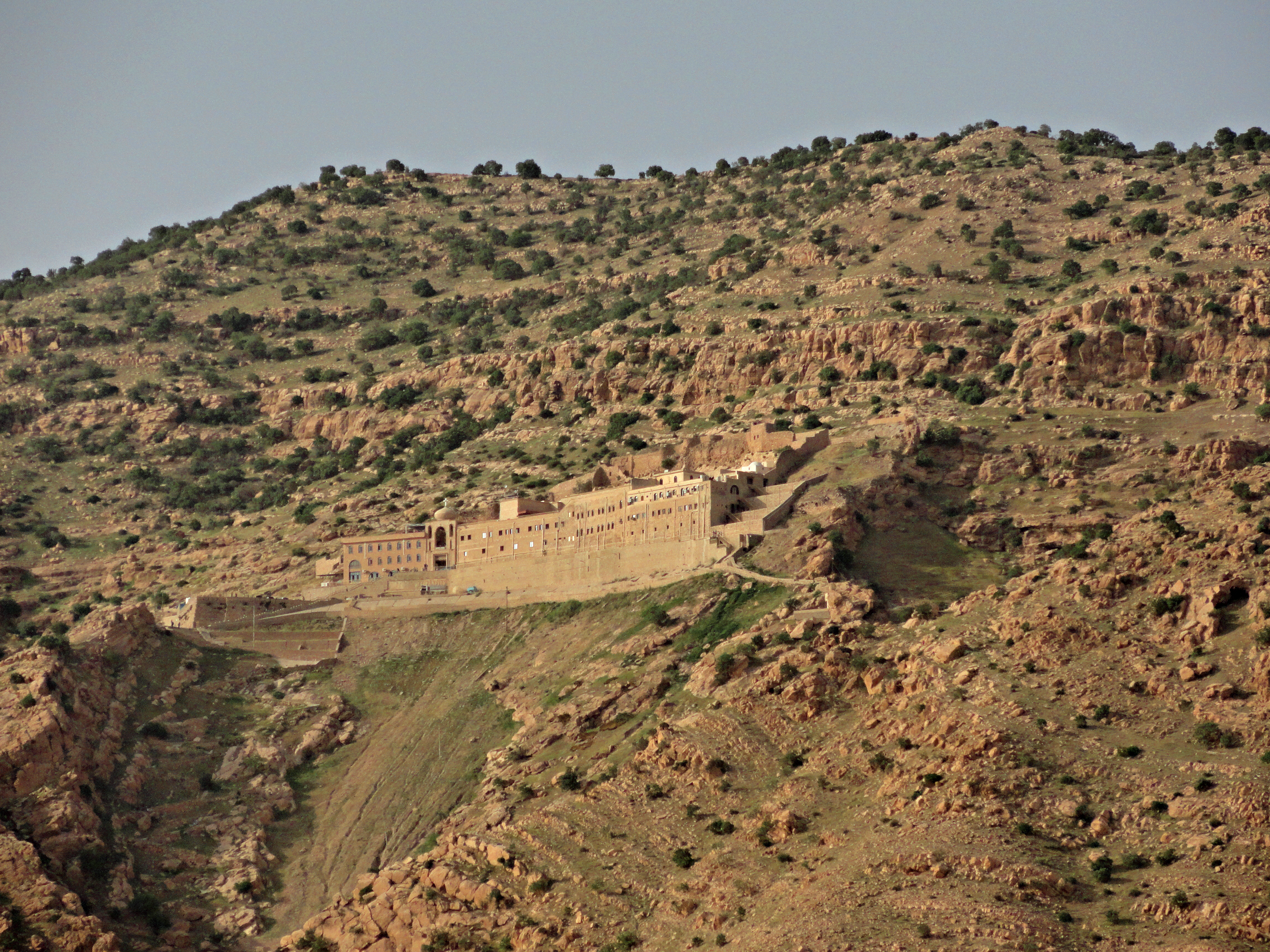 Mar-Mattai-Kloster bei Mosul